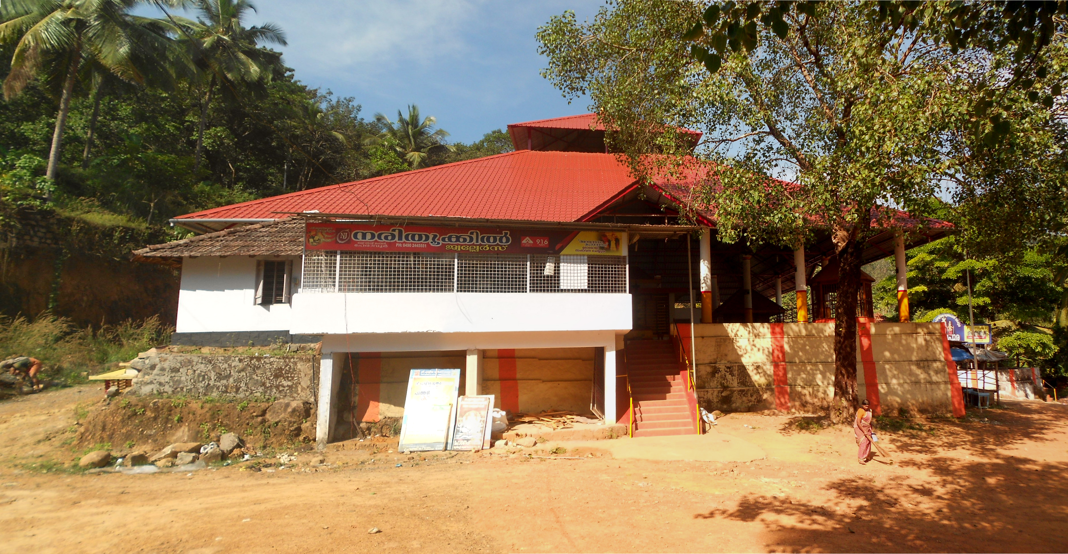 പറശ്ശിനിക്കടവ് മുത്തപ്പന്റെ ആരൂഢസ്ഥാനമായ പുരളിമലയിലെ മുത്തപ്പക്ഷേത്രം. ഇവിടെ നിത്യേന തെയ്യവും അന്നദാനവും നടത്തിവരുന്നു.